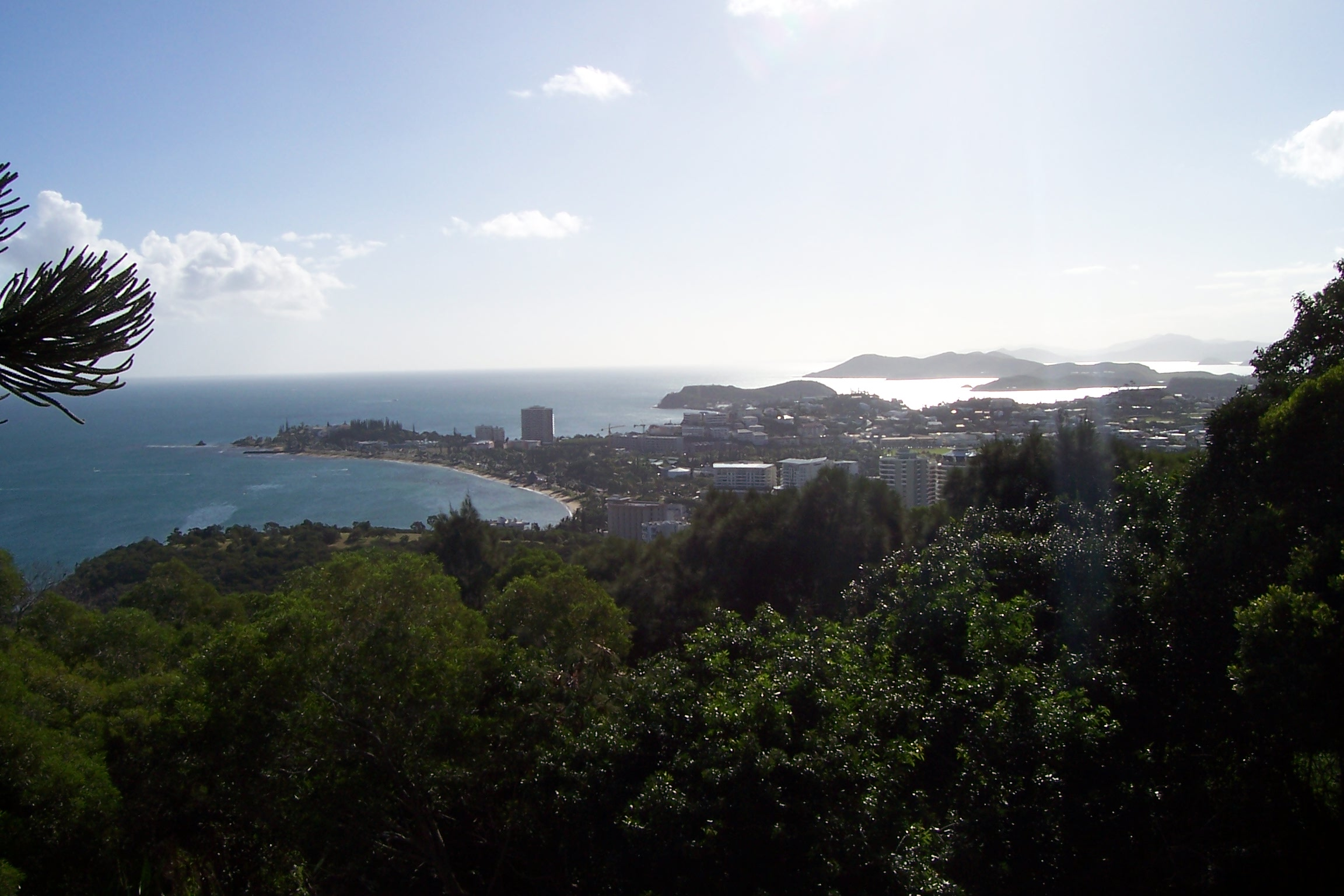 Panorama de Nouméa (Nouvelle-Calédonie, France).